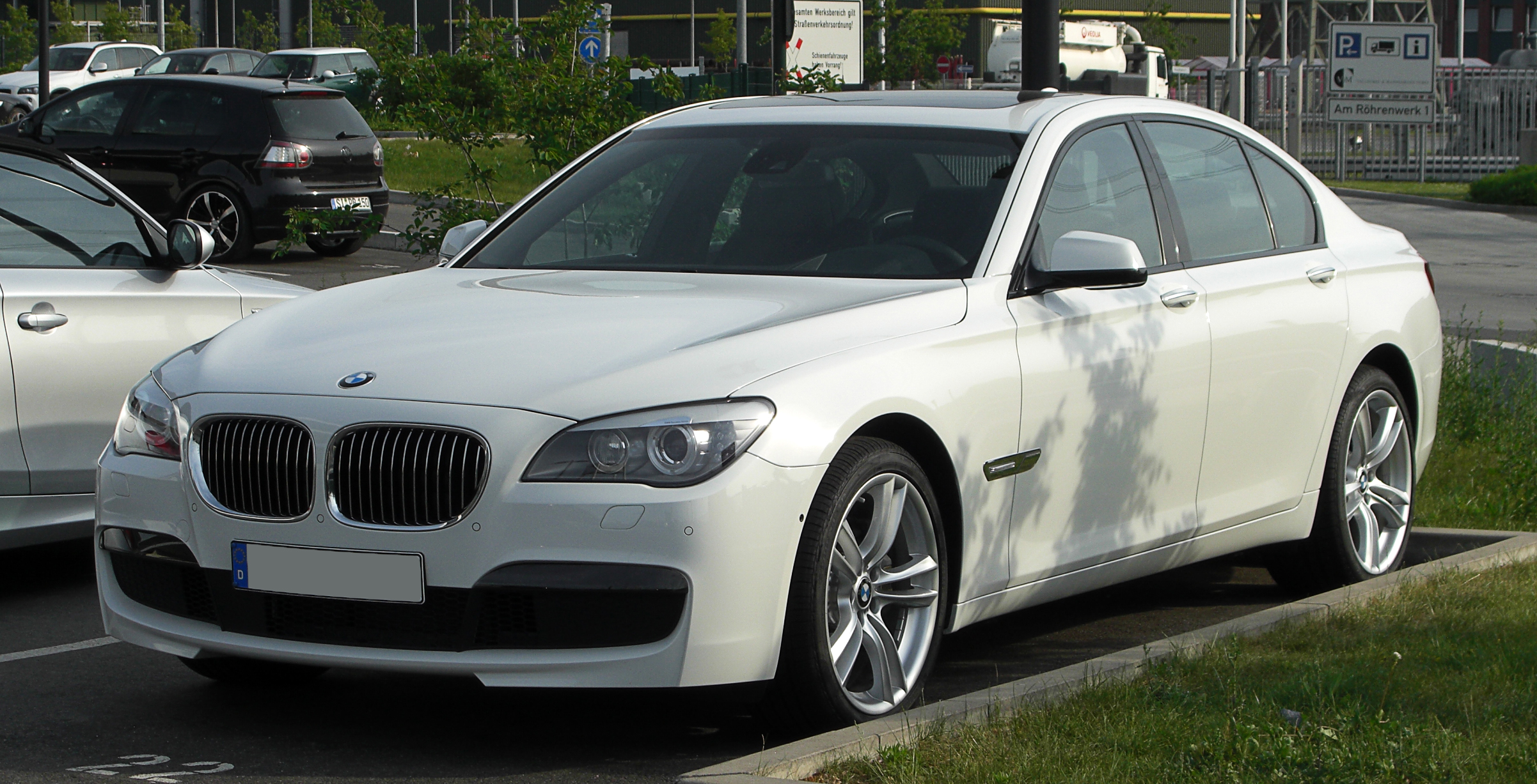 BMW 7er M-Sportpaket (F01)